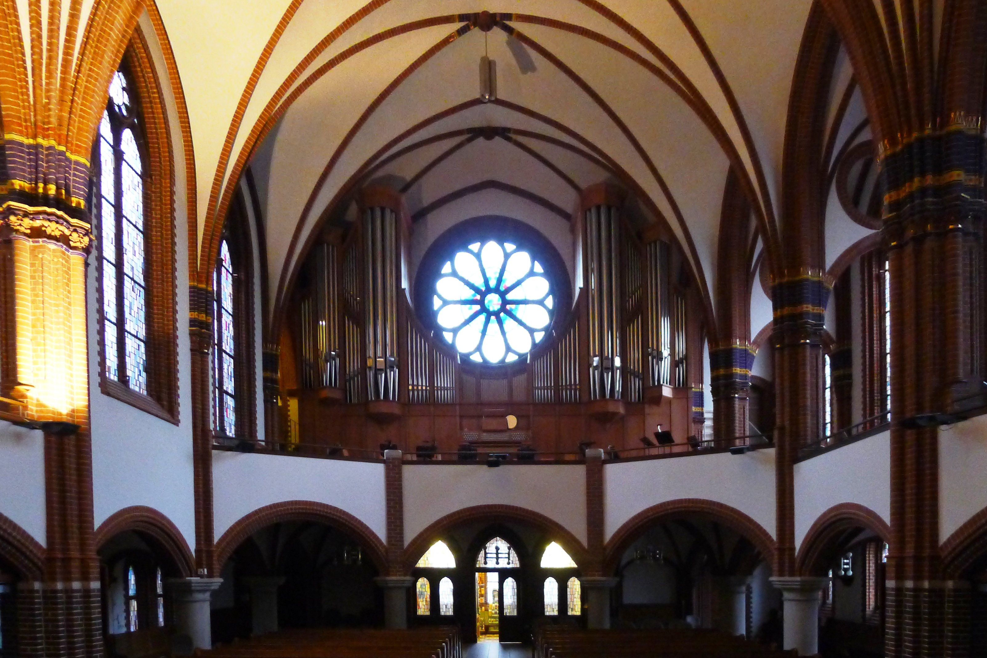 große Orgel vor der Rosette